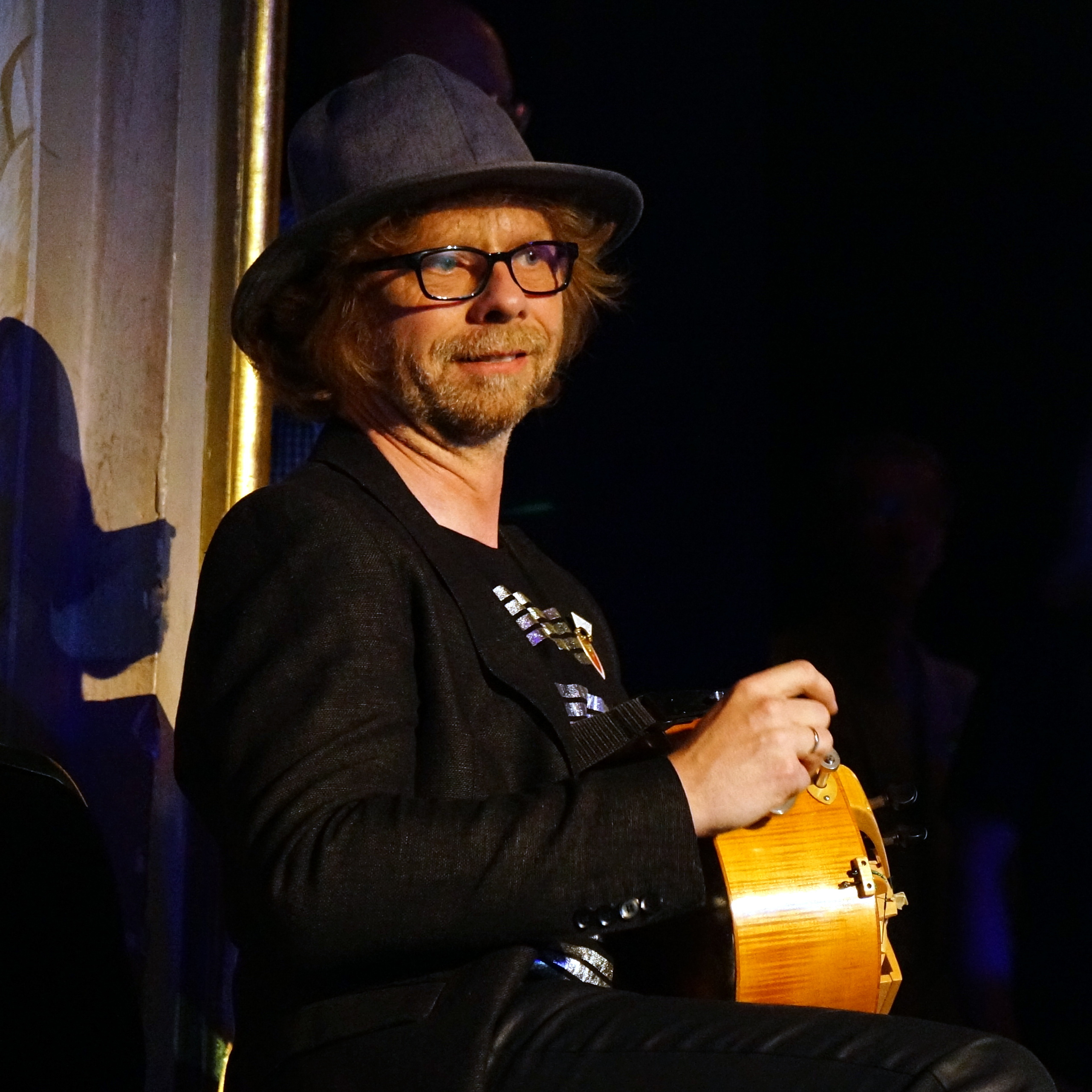 Gorzów Wlkp., 30 lat Małej Akademii Jazzu. Koncert okolicznościowy na deskach Teatru im Juliusza Osterwy. Joachim Mencel gra na lirze korbowej.